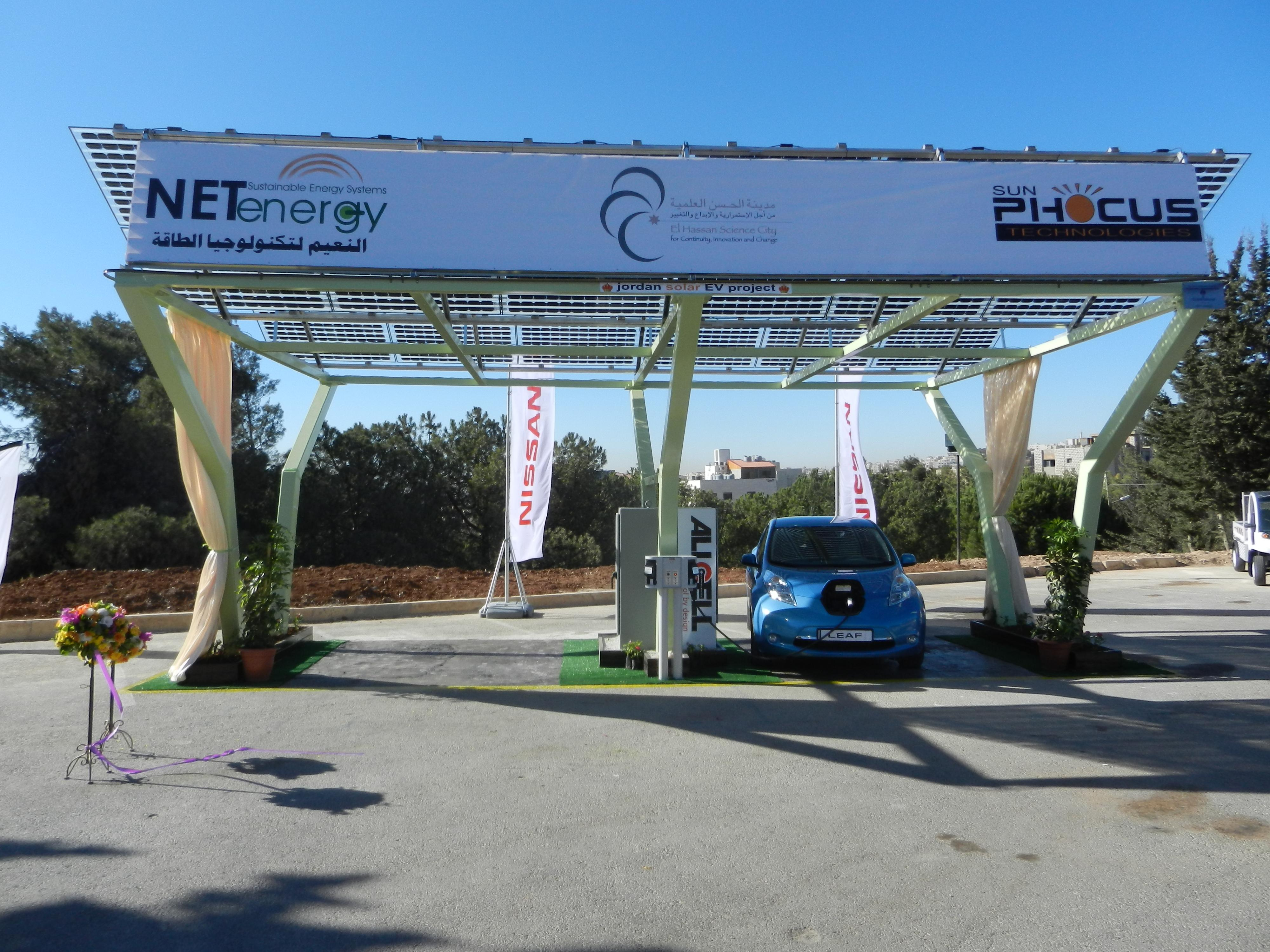 Station solaire de recharge pour VE à Amman, en Jordanie